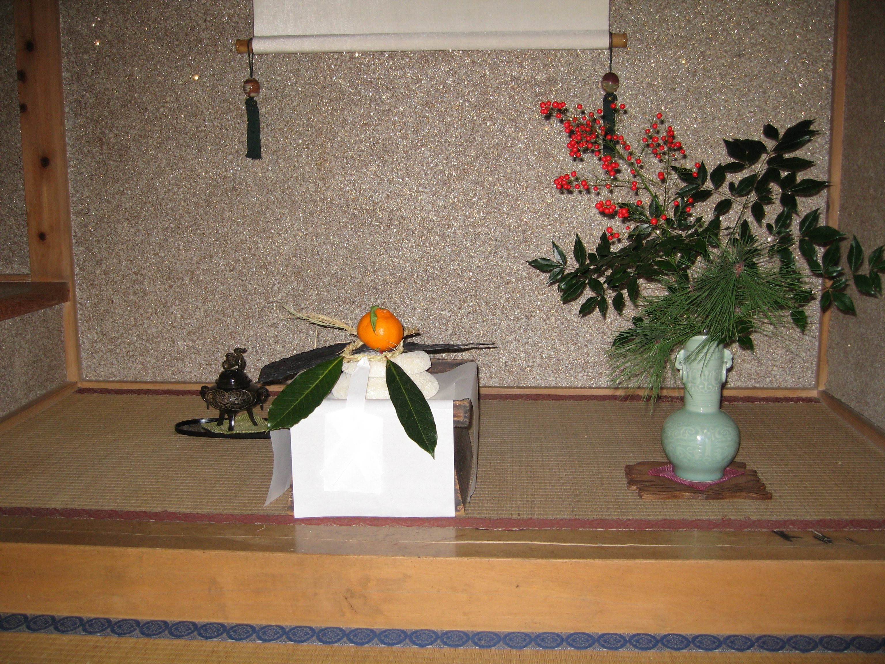 床の間にしつらえた鏡餅